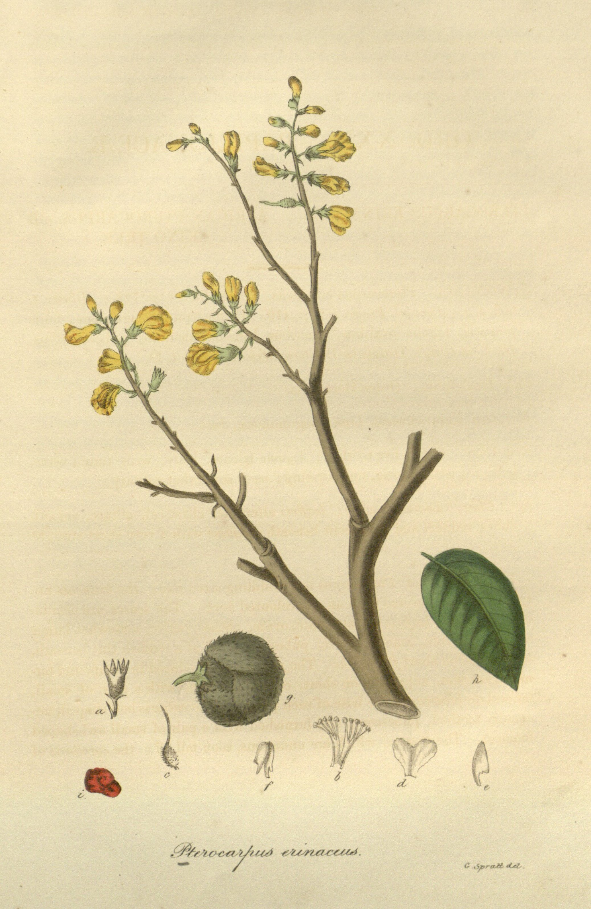 illustration botanique